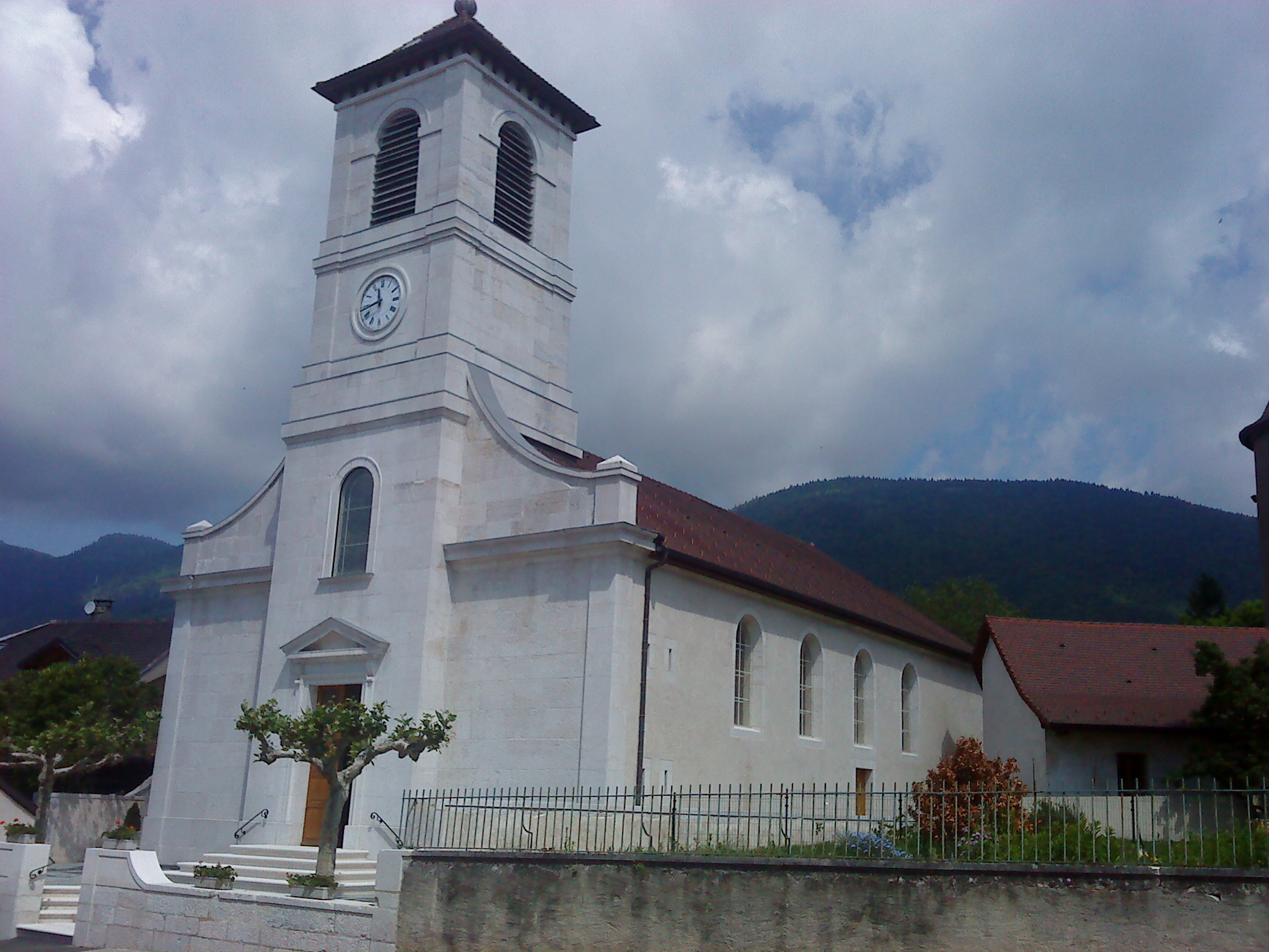 Eglise Saint-Christophe de Vesancy, Ain, France